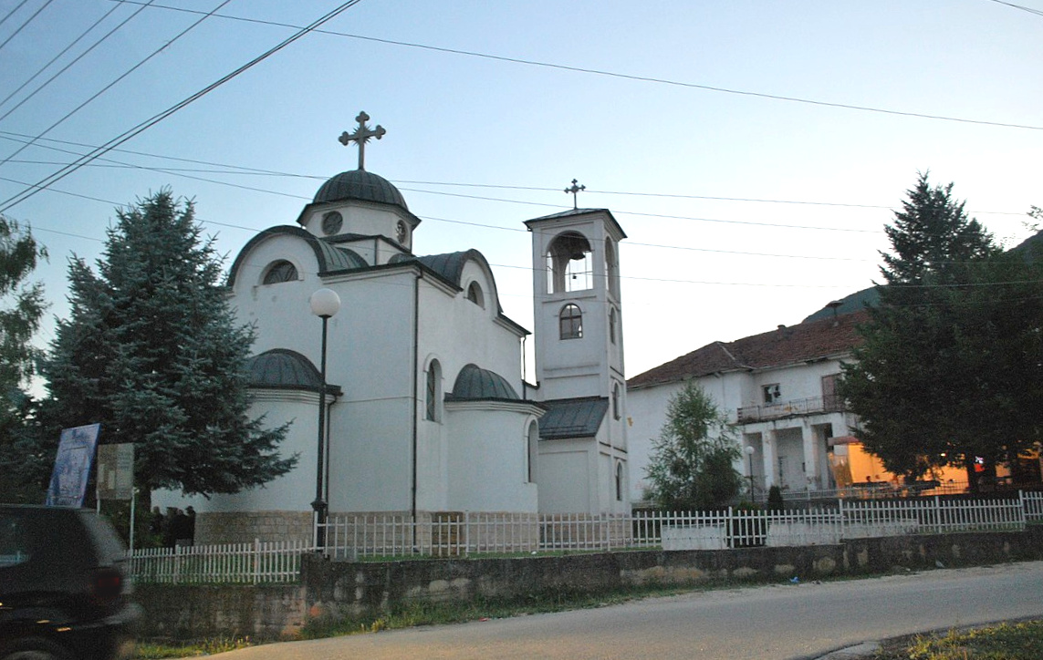 Црквата „Св. Димитриј Солунски“ во центарот на тетовско Теарце